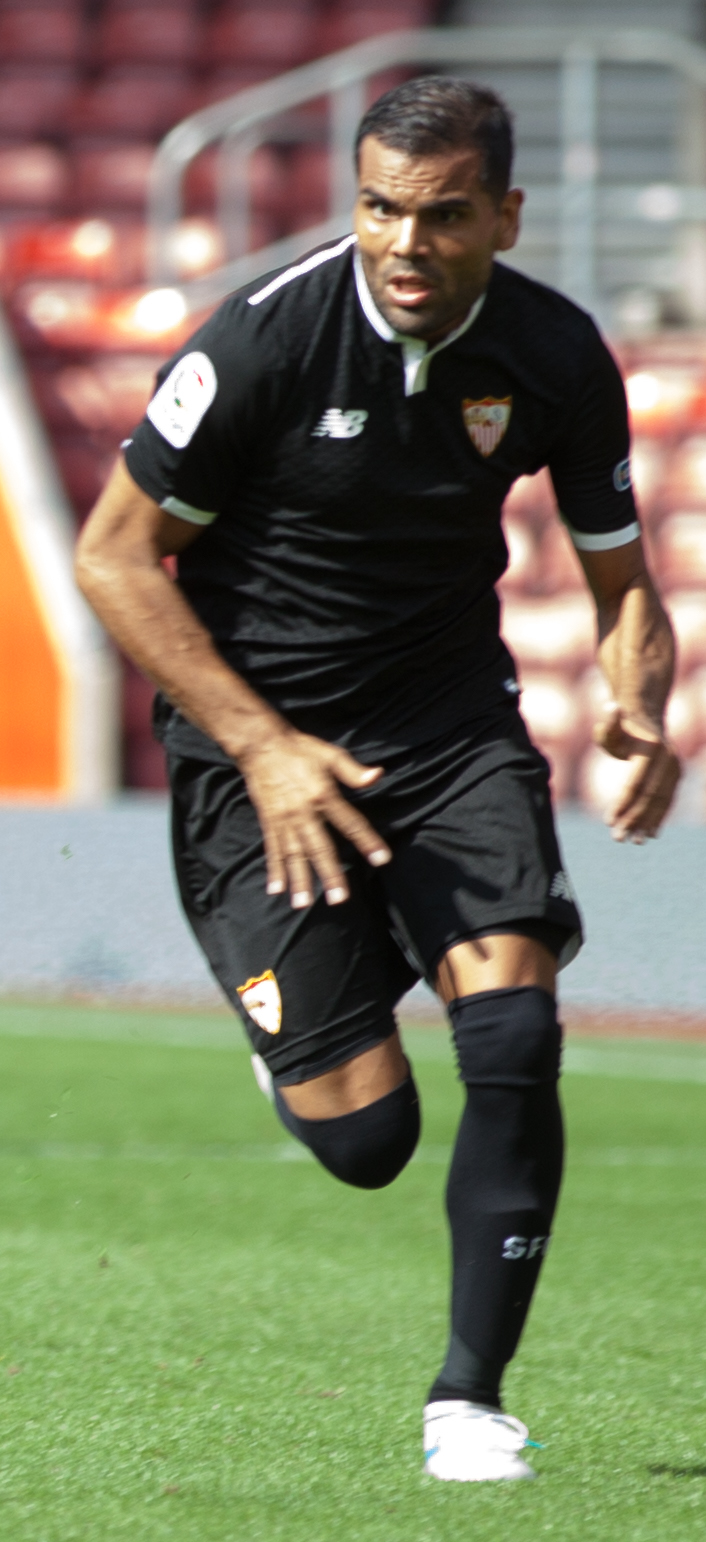 Image by Steve Hogg